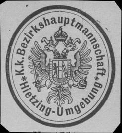 Sealing stamp Title: K.K. Bezirkshauptmannschaft Hietzing-Umgebung Description: Briefsiegel, weiß, schwarz Place: Hietzing size: 3x3 cm